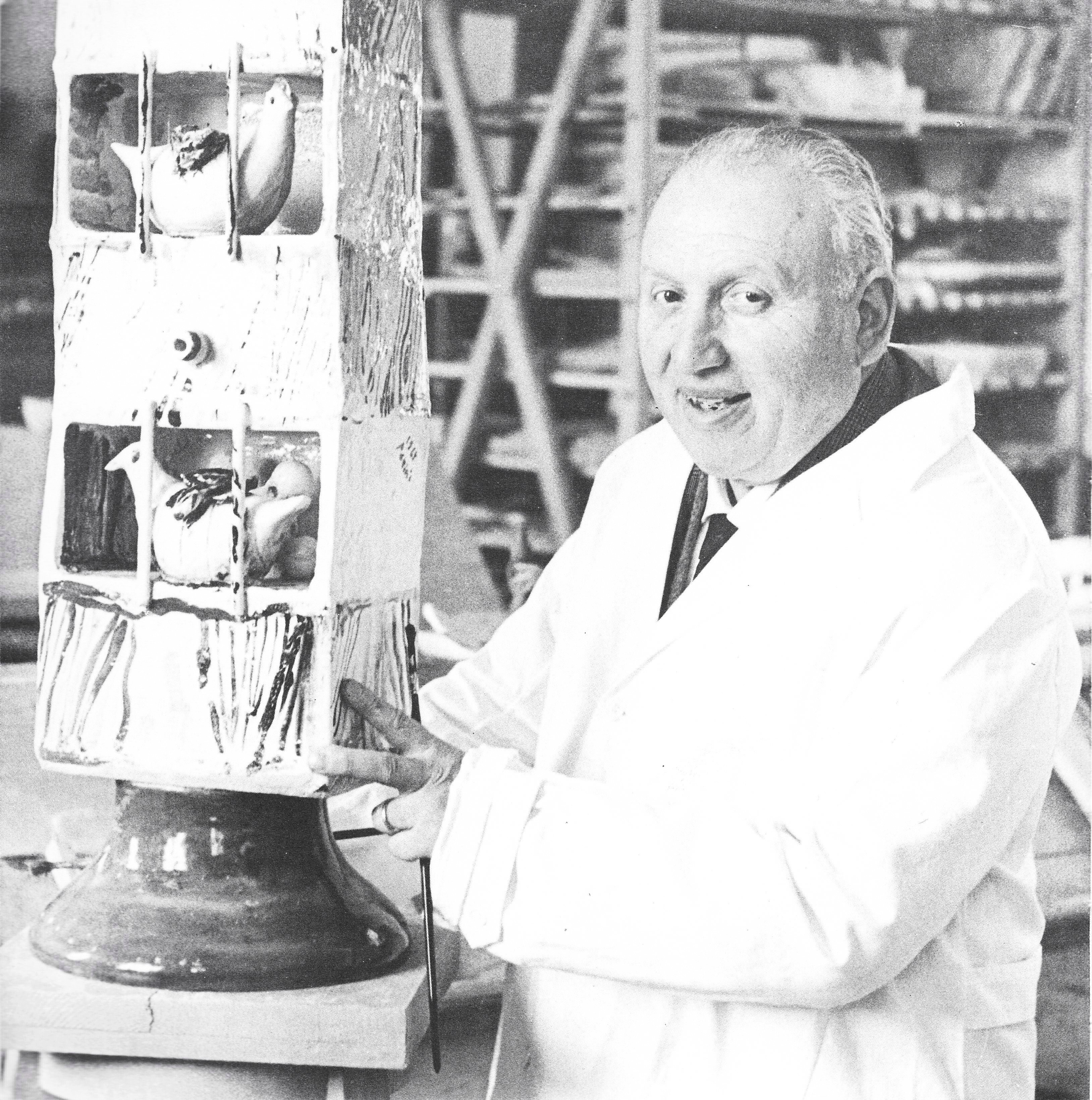 L'artista ritratto accanto all'opera "Cucca della famiglia". Per gentile concessione del Comune di Nove, 11/03/2013, Prot. n. 0002470, la foto è tratta dal volume "Andrea Parini - Ceramiche 1935 - 1970, Neri Pozza Editore, 1983